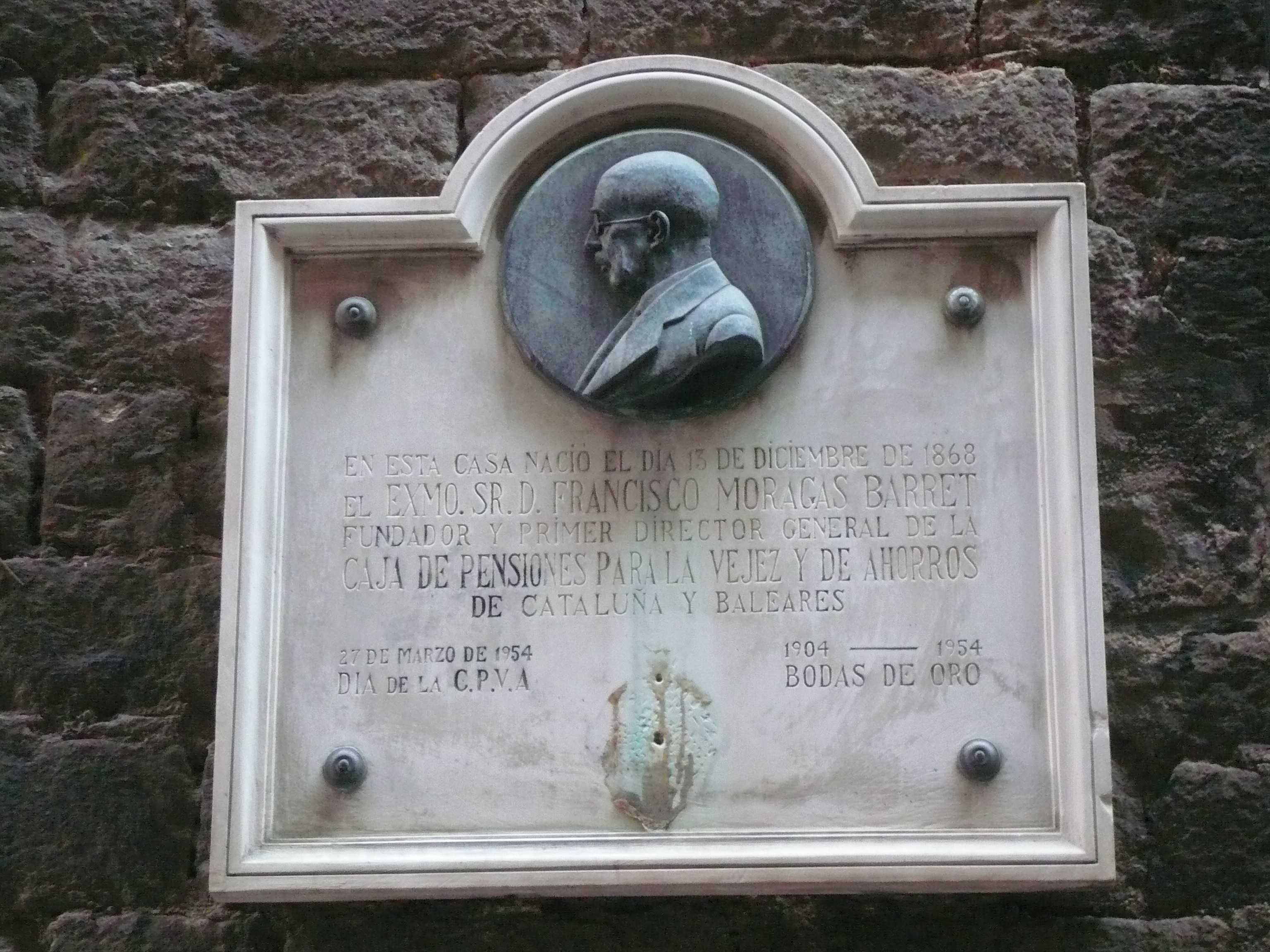 Placa commemorativa a la casa natal de Francesc de Moragas